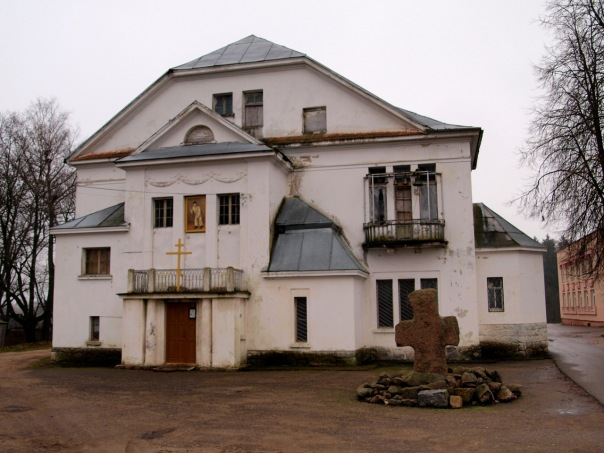 Беларуская (тарашкевіца): Царква ў імя Пакрова Прасьвятой Багародзіцы. в. Межава This is a photo of Belarusian heritage monument. Reference number: 213Г000135 ( WLM)